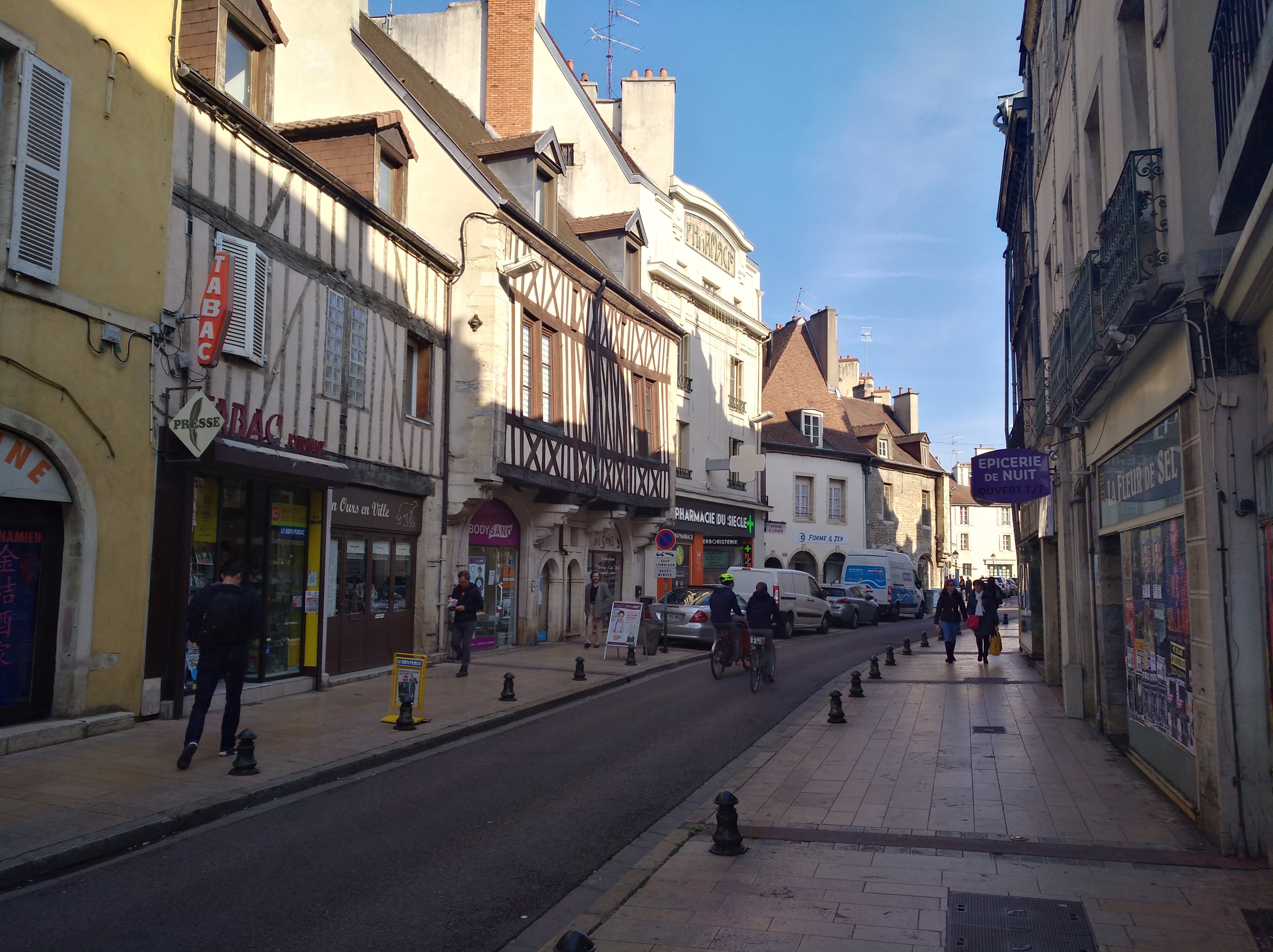 Rue Monge à Dijon (Côte-d'Or, France).